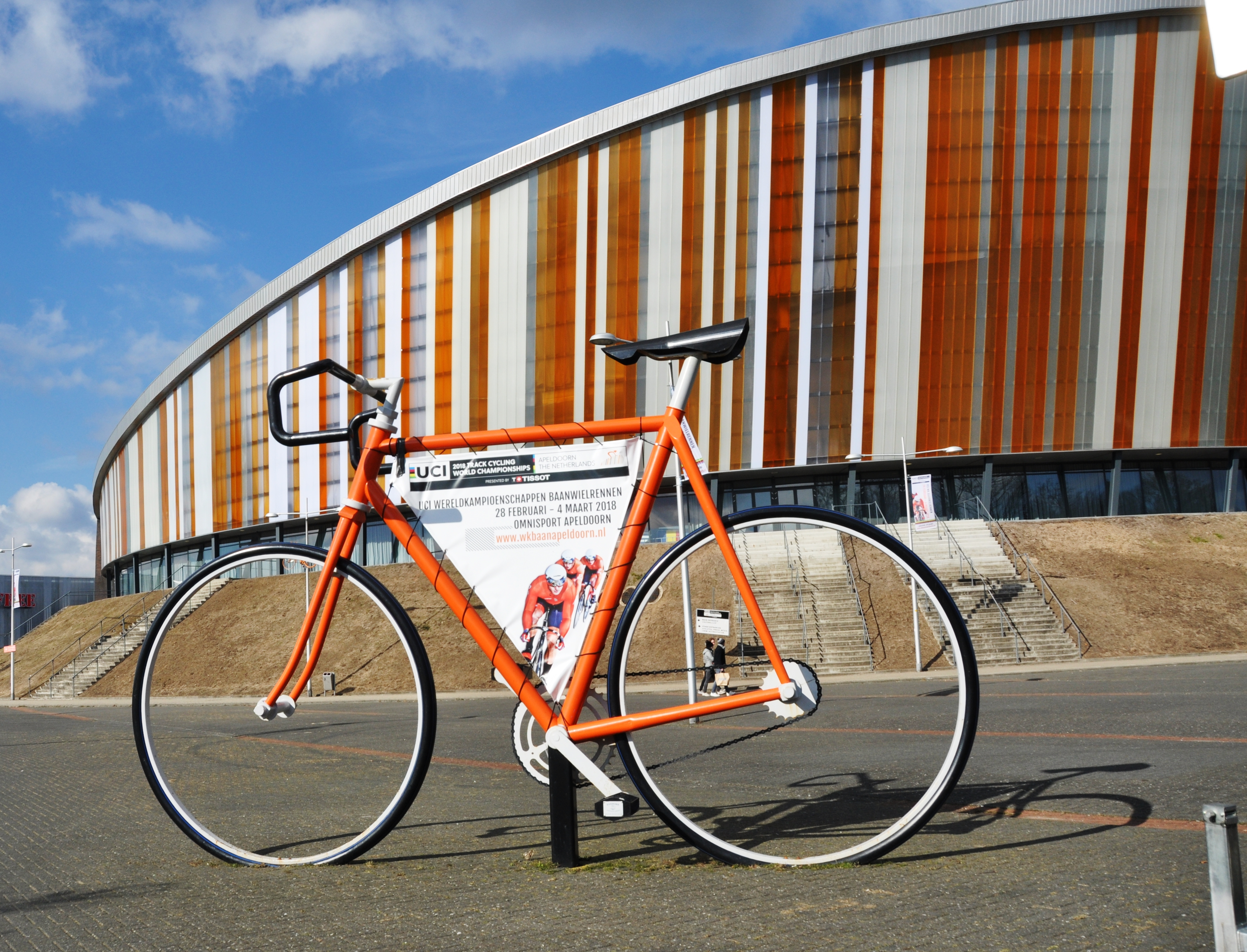 Omnisport, Apeldoorn